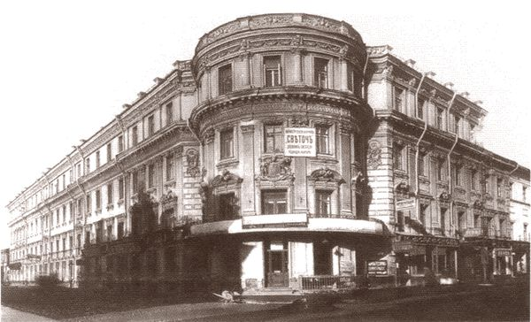 Квартира, в которой проживала Луиза Симон-Диман (дом графа Гудовича в Брюсовом переулке. Фото 1907 года0